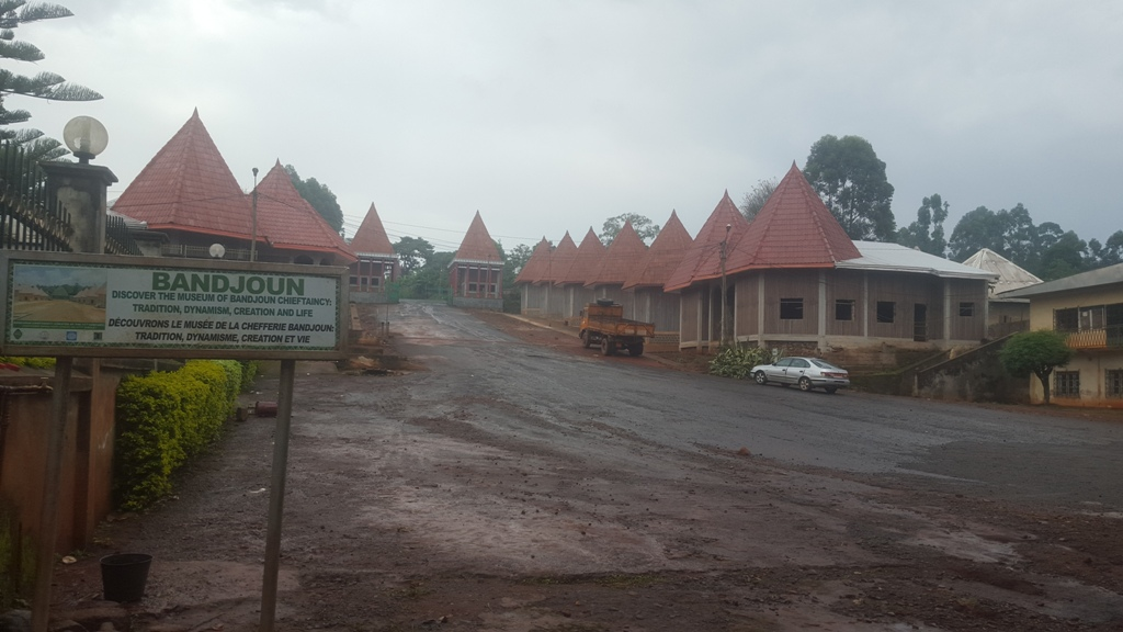 The Bandjoun chiefdom is located in the west region of Cameroon.